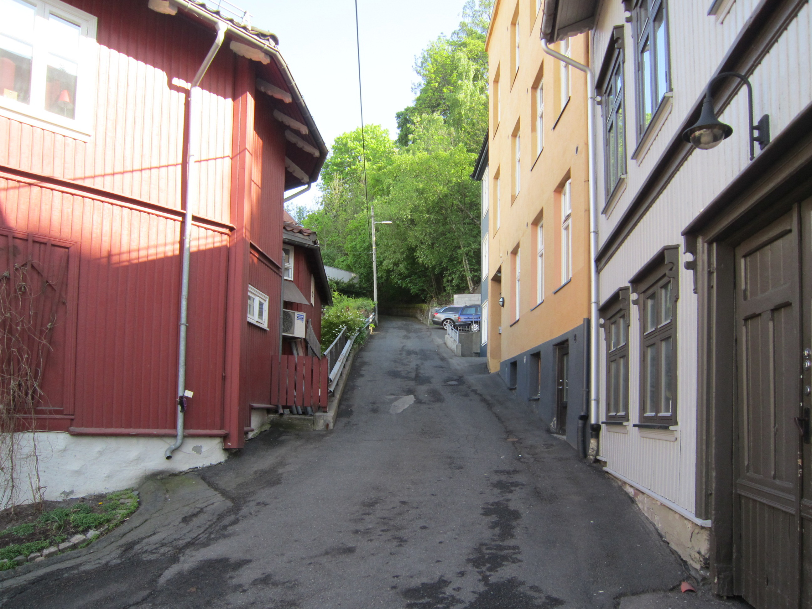 Ribbunggata i Gamlebyen i Oslo går opp fra Konows gate.